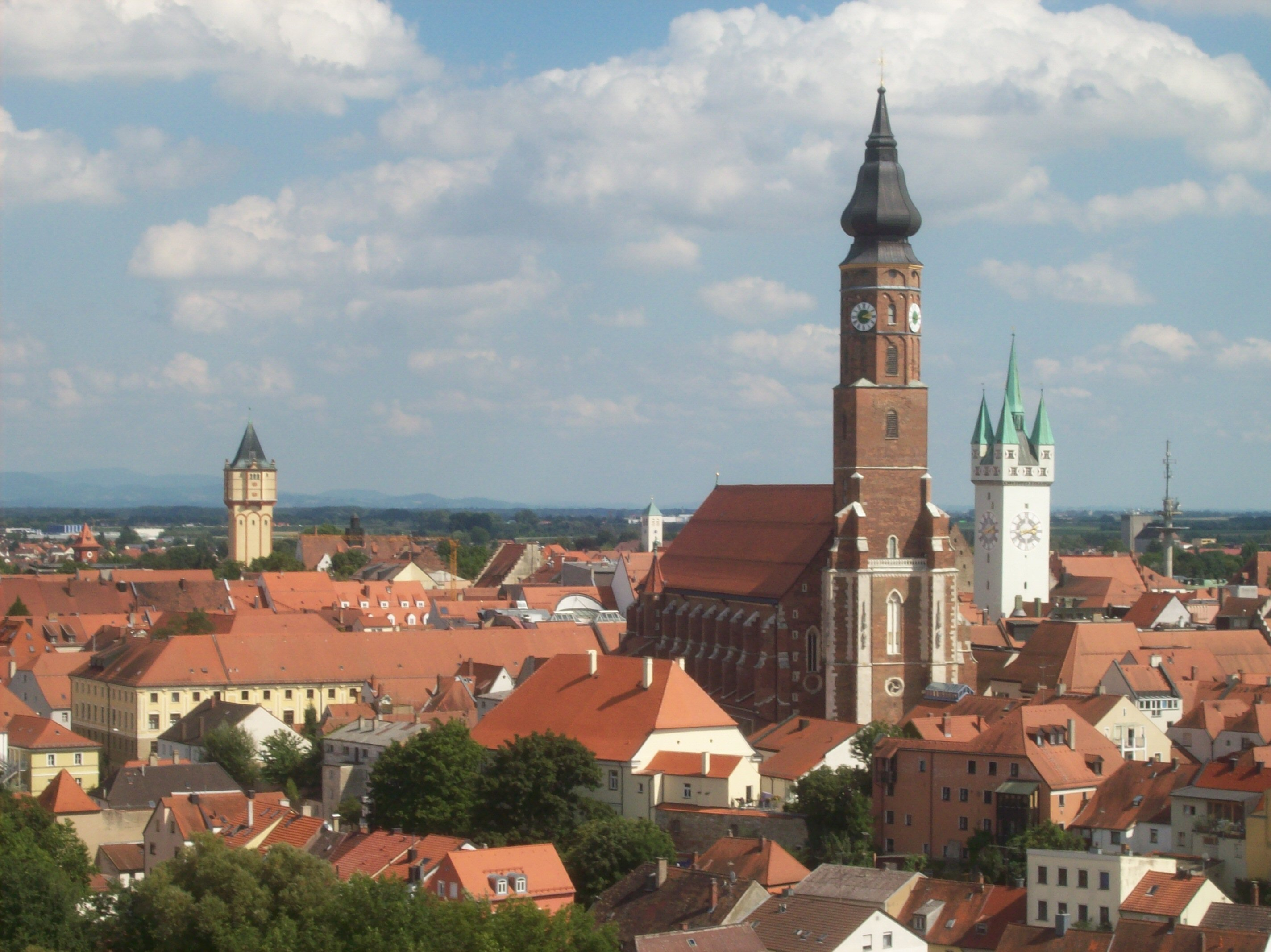 Straubing von oben (Gäuboden-Fest 2008, Riesenrad)